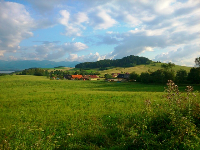 Ižipovce sever